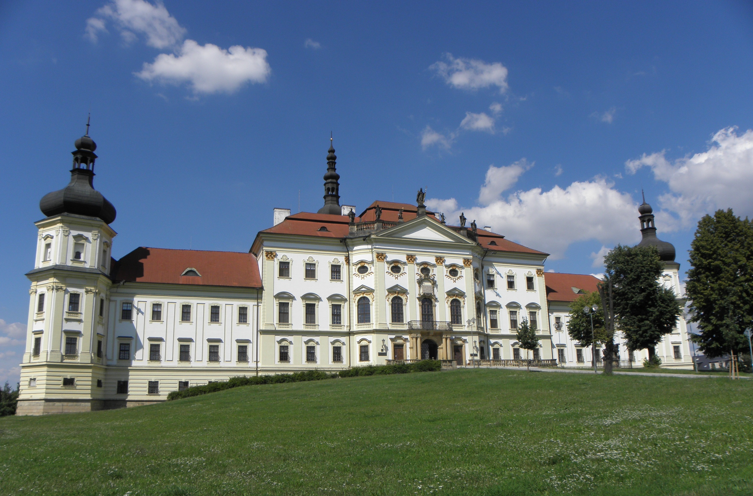 Klášter Hradisko Olomouc